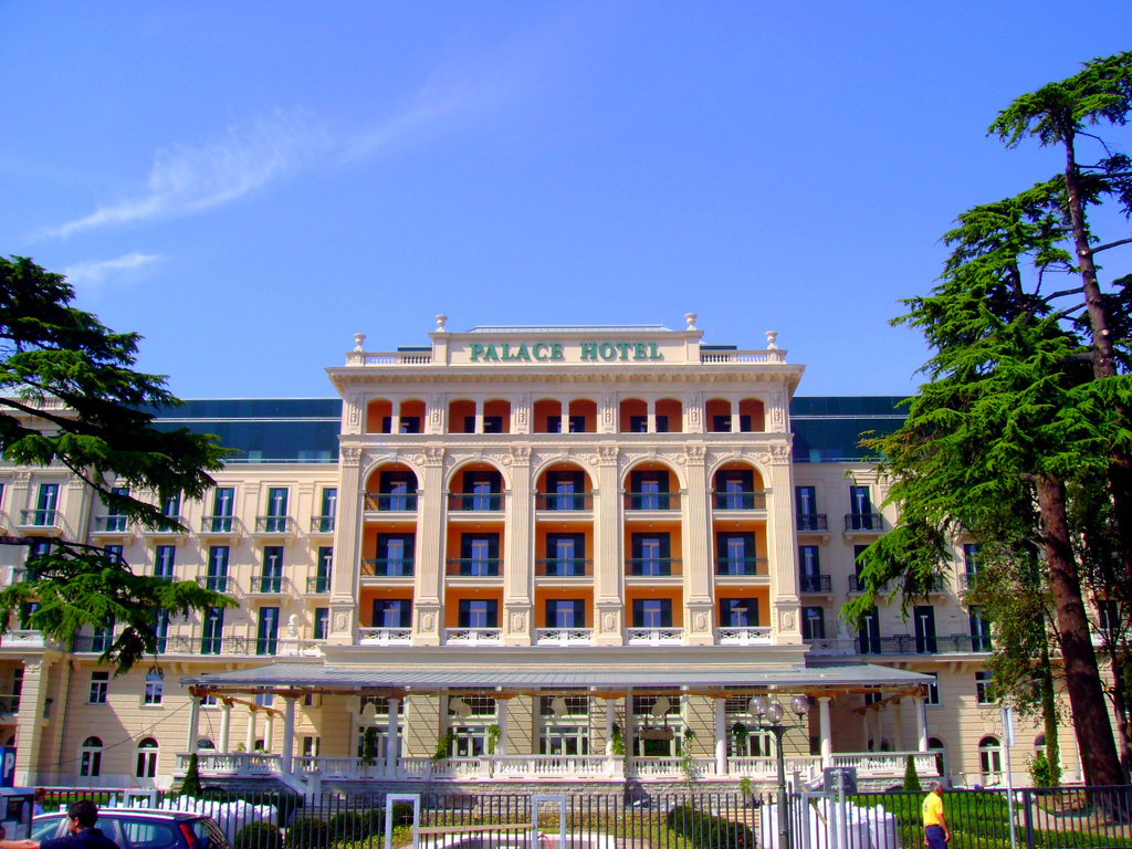 Palace Hotel in Portoroz, Slovenia